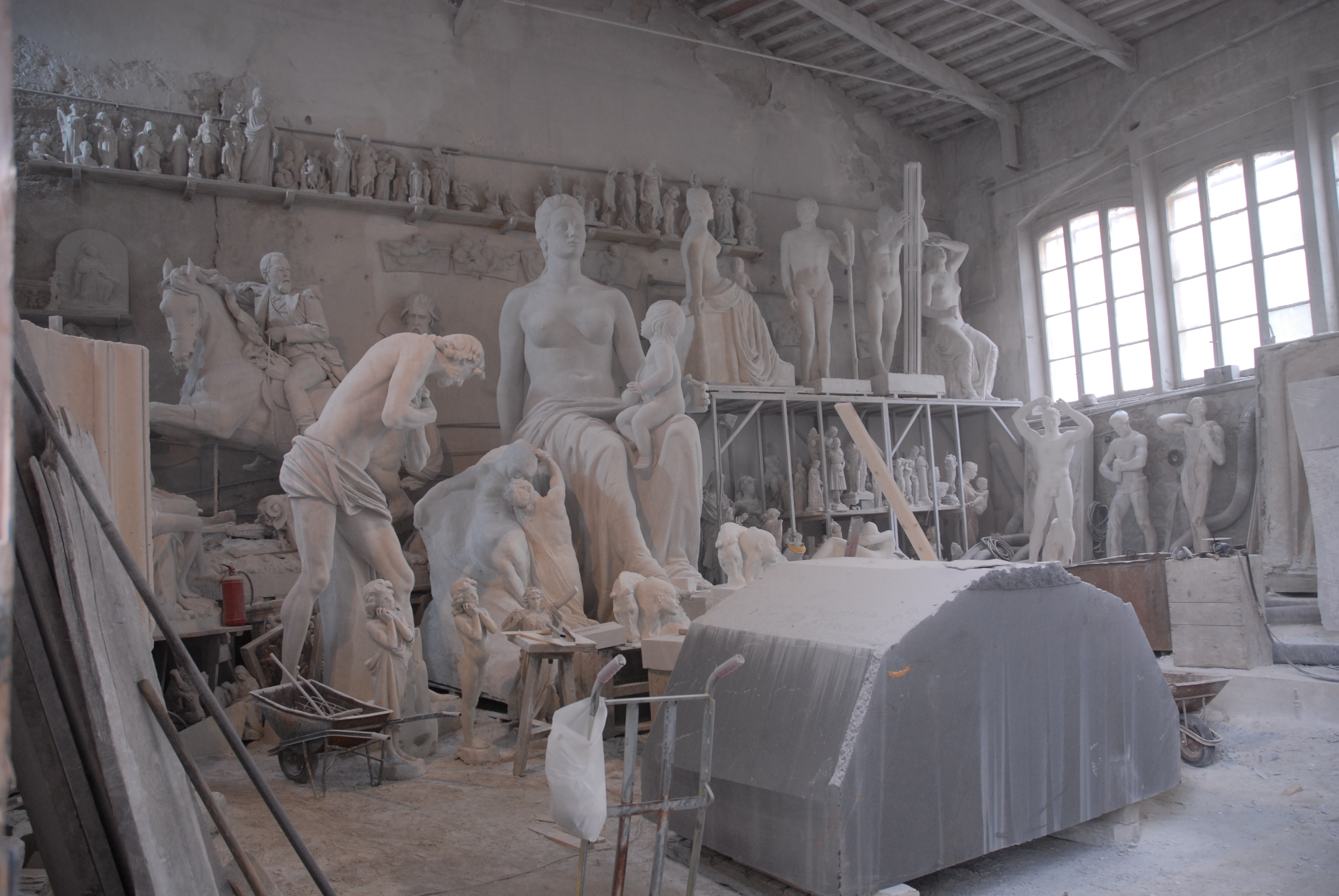 Carrara, Toscana, Italia